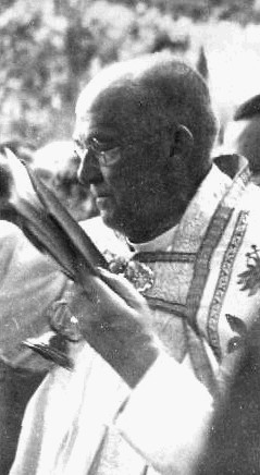 Josef Králíček (1870 - 1939), Český římskokatolický kněz.